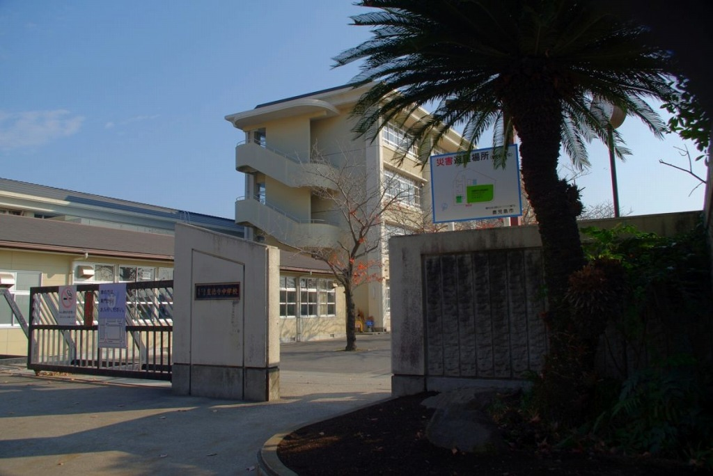 鹿児島市立皇徳寺中学校の外観。